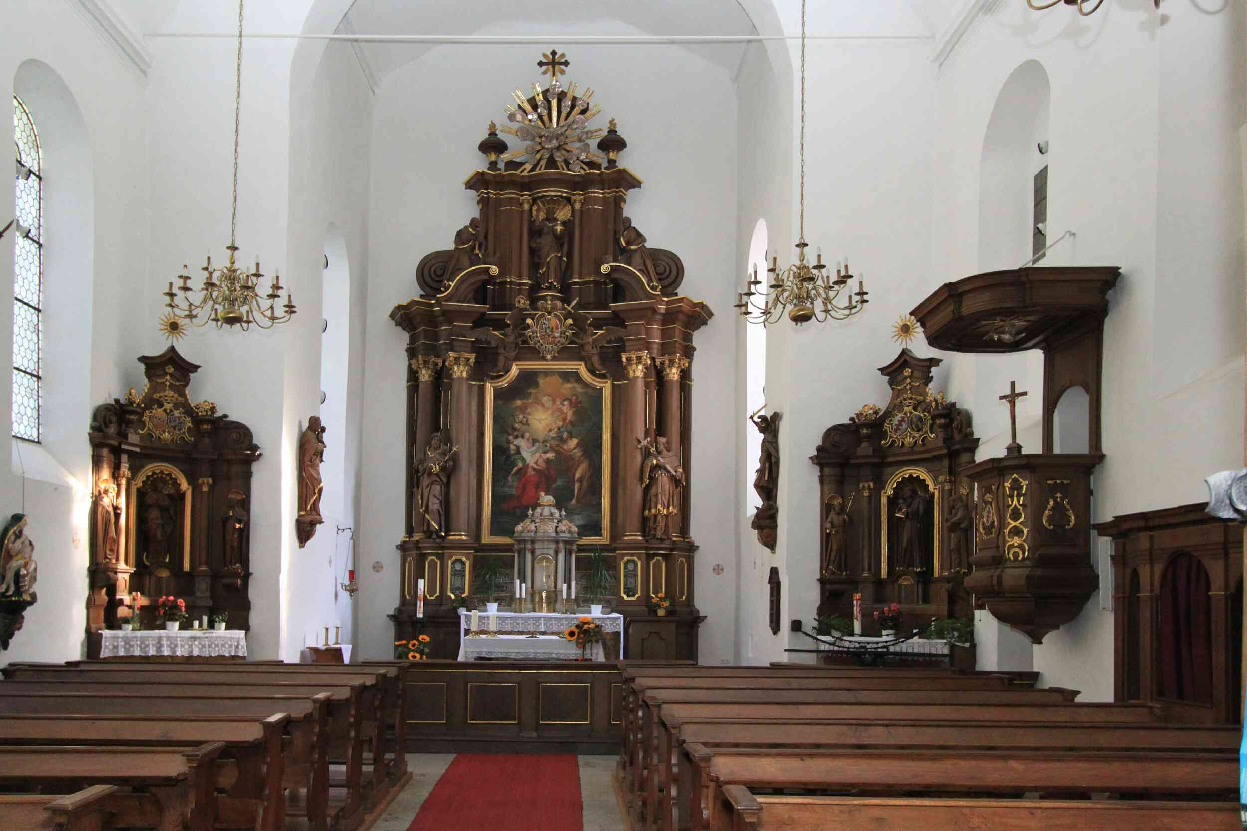 Altar in der Kirche Kloster Brunnen